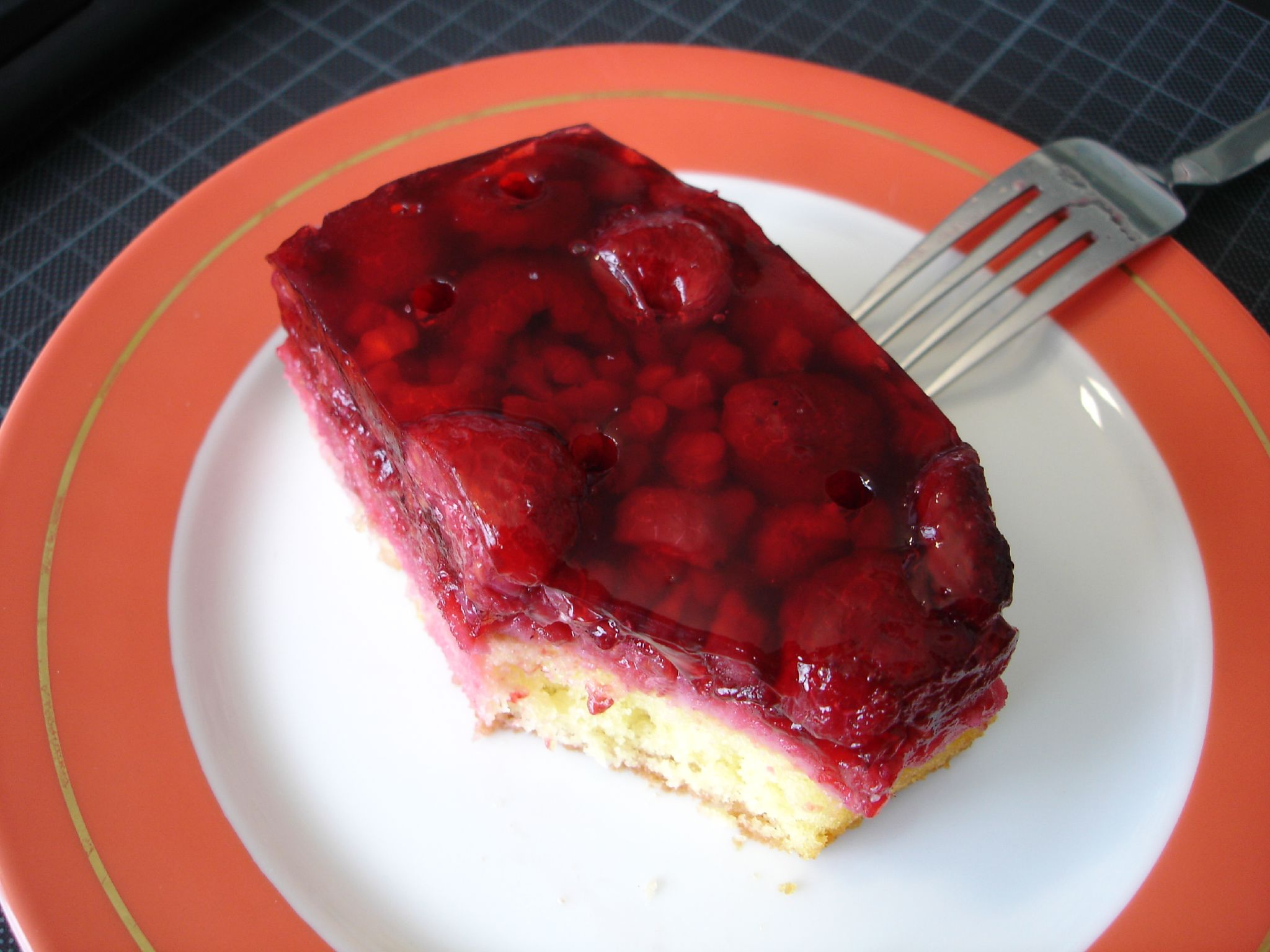 name der backware: Himbeerkuchen gekauft am: 28/08/2006 uhrzeit: 10:00 preis: 1,50 euro name des baeckers: Der Kalchreuther Bäcker Manfred Wiehgärtner GmbH adresse des baeckers: Nürnberger Straße XXX, 91052 Erlangen optische note: 1 geruchs note: 1 konsistenz: gutes festes Gelee, frische Himbeeren, softer Boden mit festem Unterboden inhaltsstoffe: (wird noch nachgereicht) sensorische note: 1 herkunftland des inhabers: Deutschland